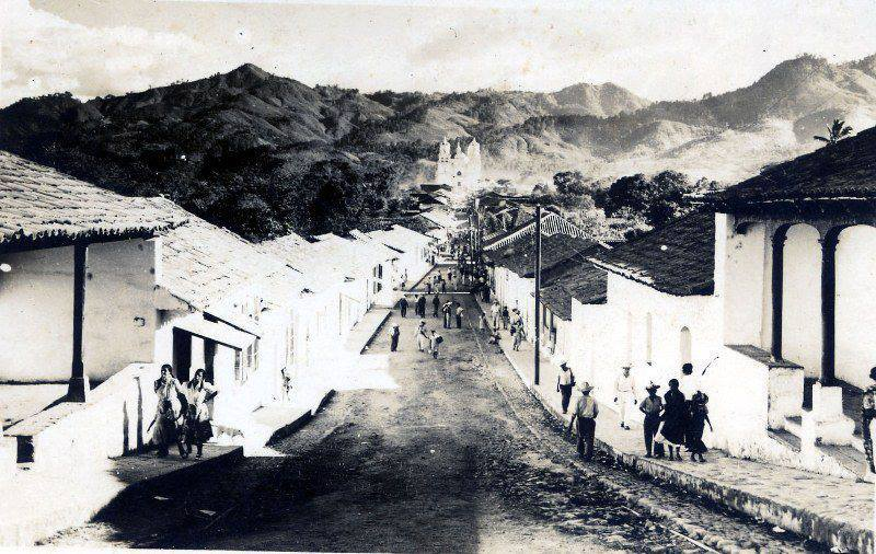 Ciudad de Esquipulas en 1902, foto ubicada en la Biblioteca de Esquipulas.